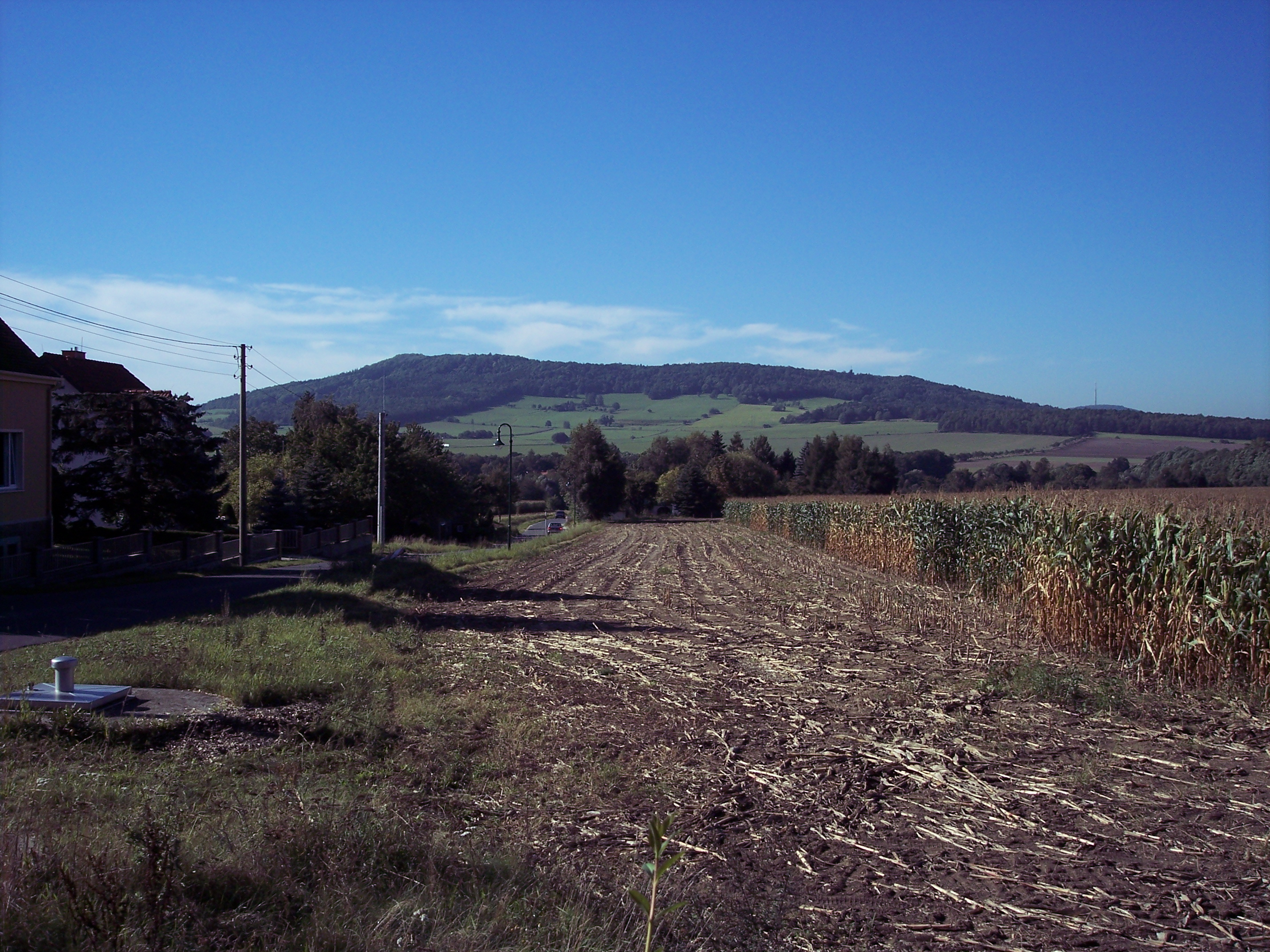 Blick auf den 455 m hohen Rotstein von Sohland aus